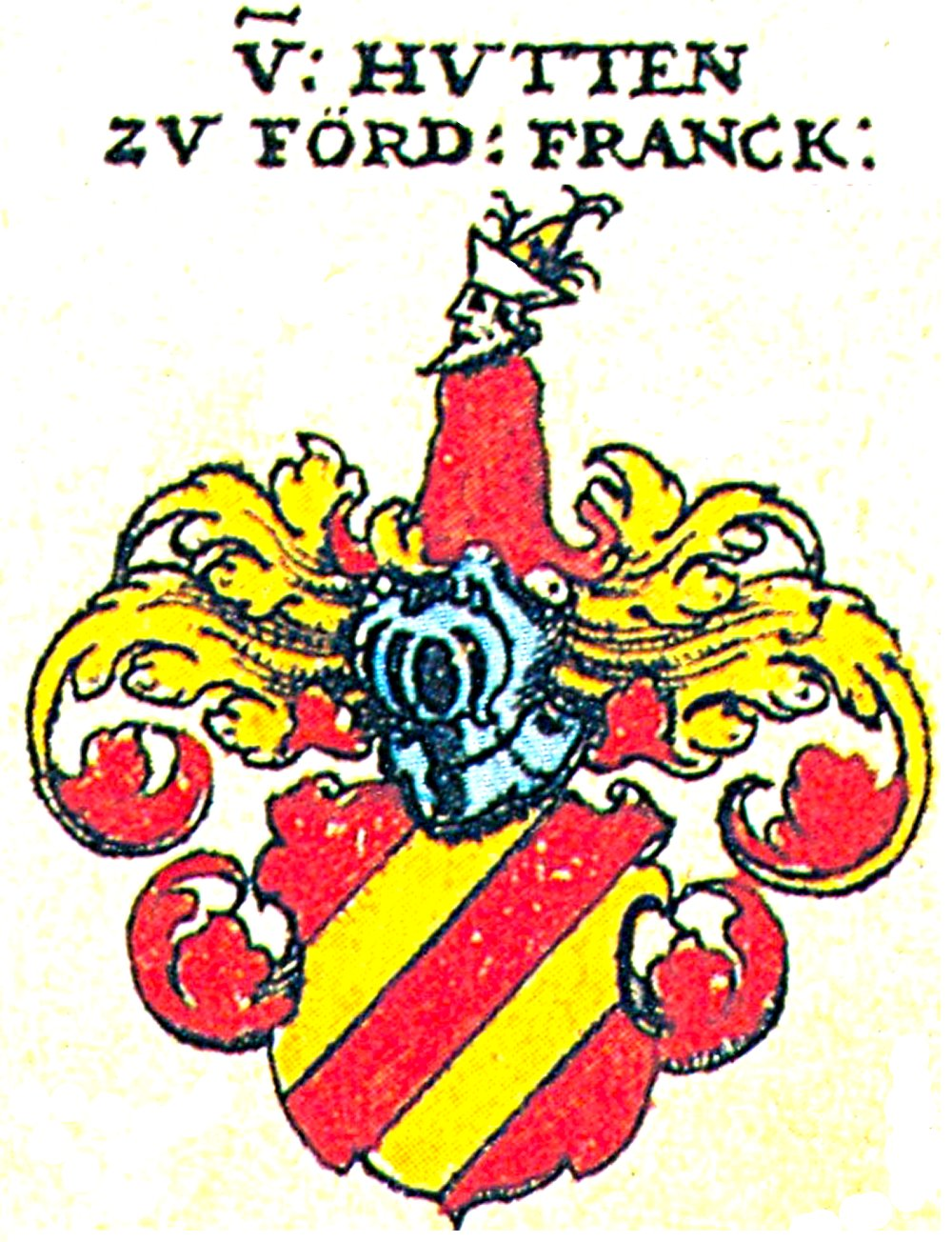 Ritterschaft und Adel in Franken von Hutten zu Frankenberg